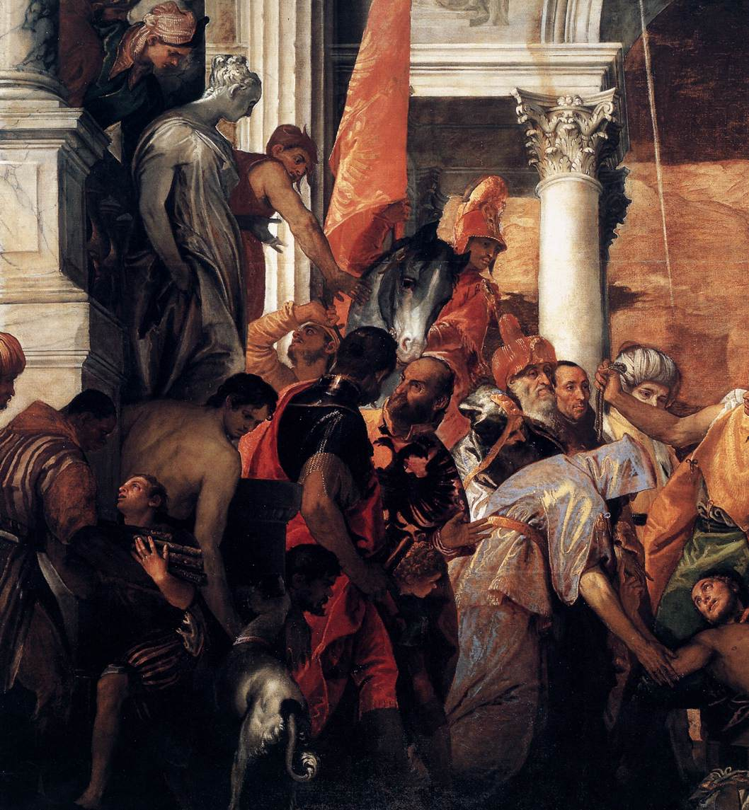 detail